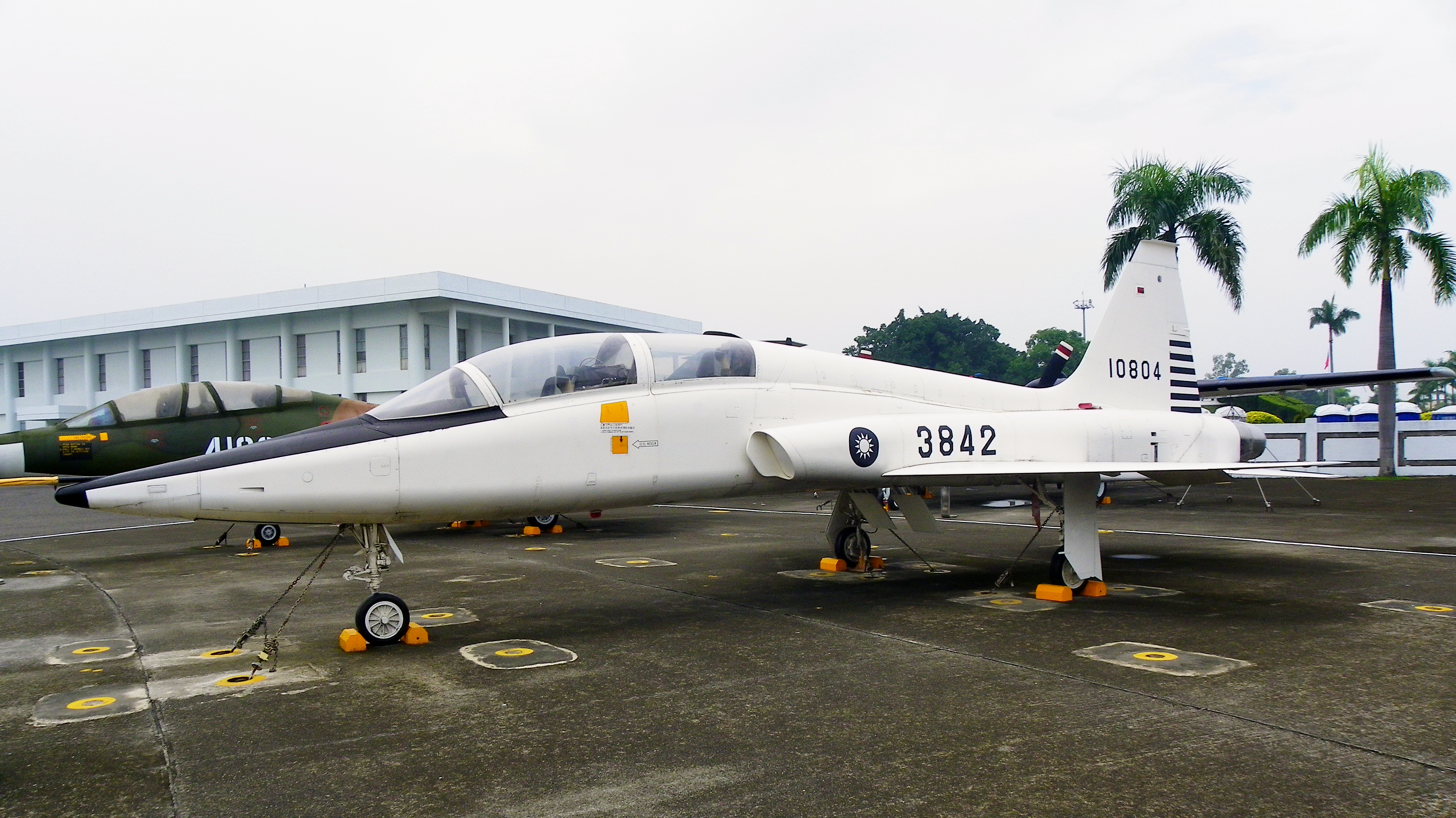 岡山空軍官校軍機展示場的T-38A利爪式教練機，1972年越戰期間，中華民國空軍提供50架F-5A\B予越南空軍後，美國提供21架T-38A作為機種轉換訓練，以補戰機之不足，至1985年始歸還。